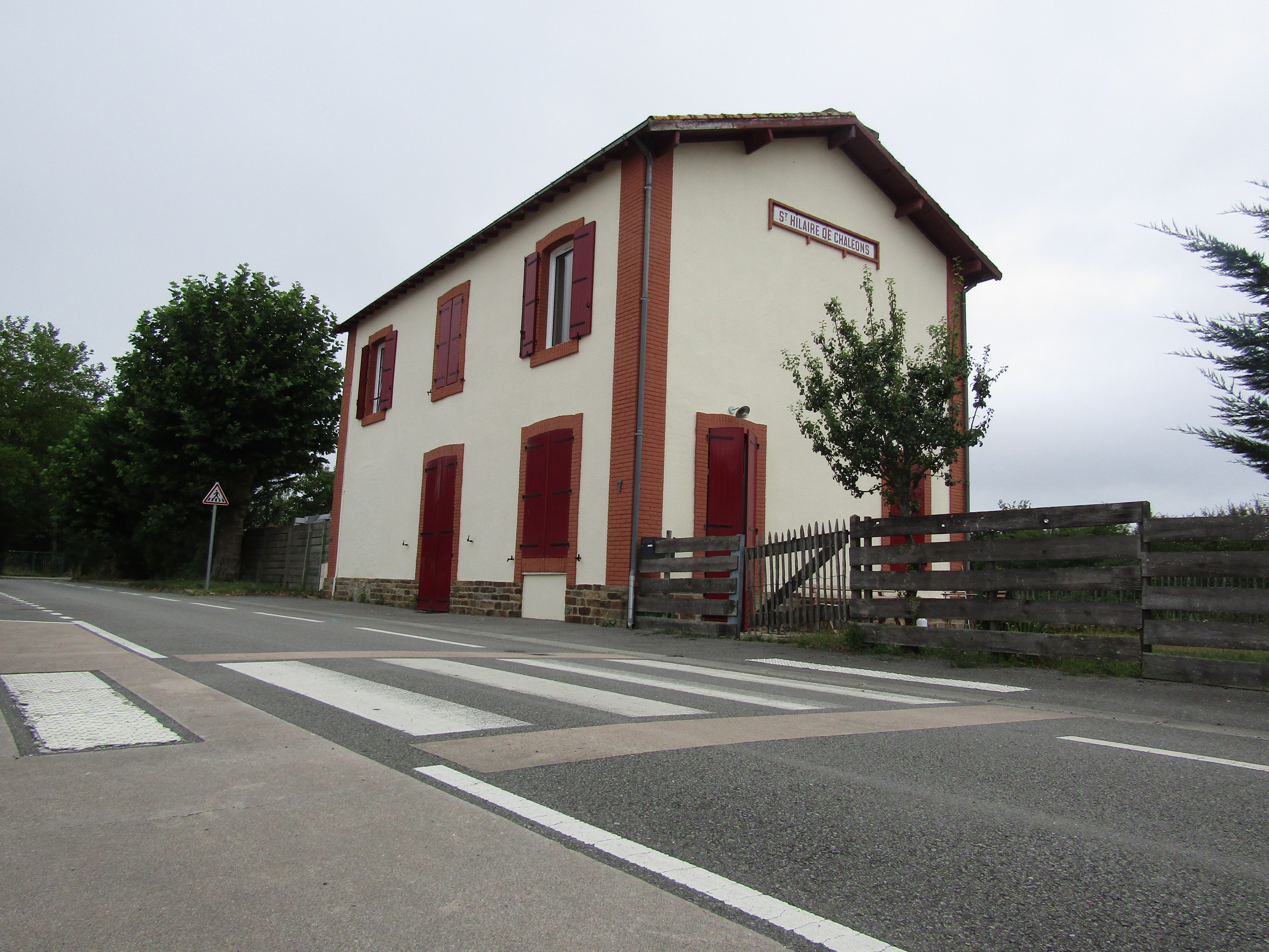 Gare de Saint-Hilaire-de-Chaléons, l'ancien bâtiment voyageurs